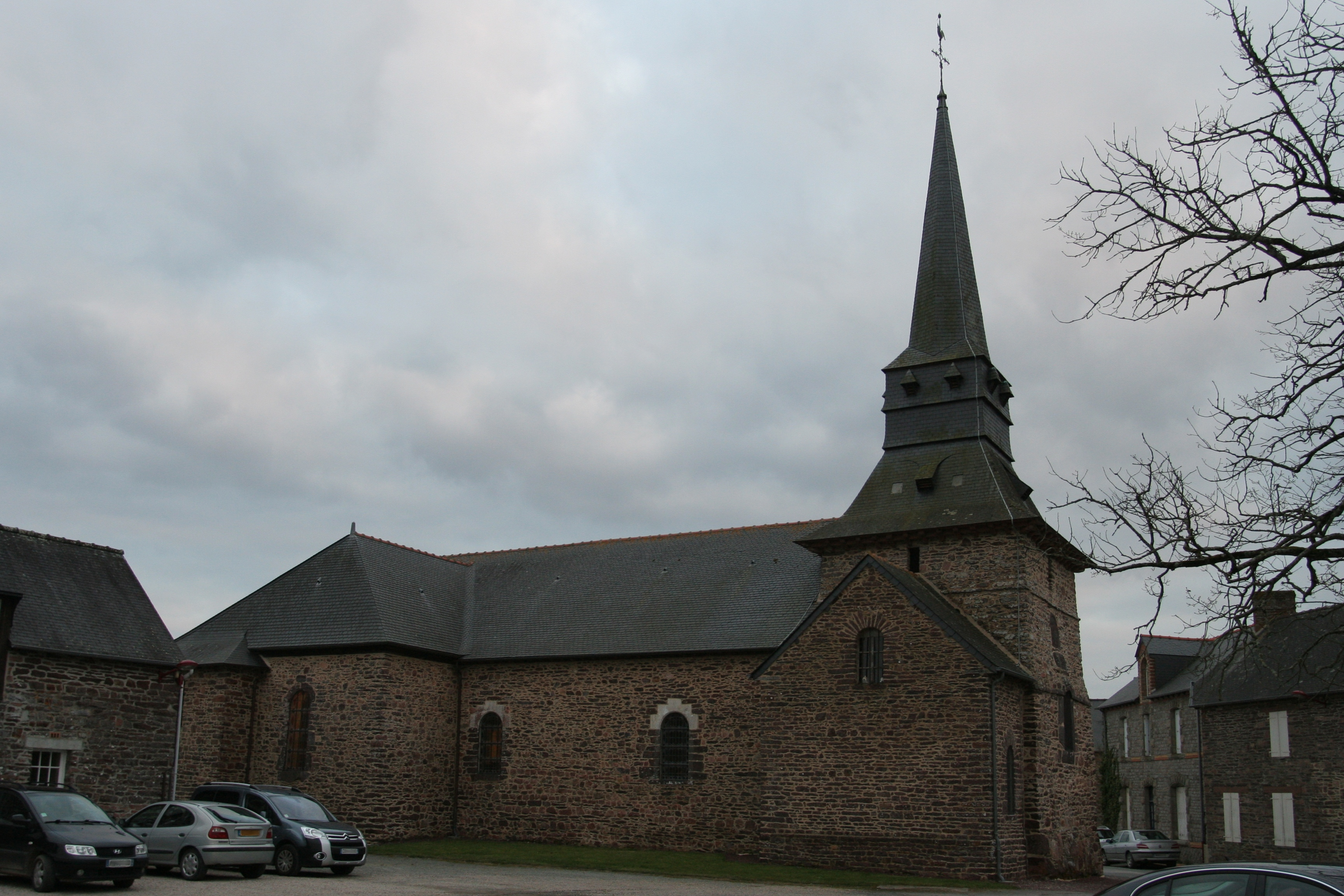 Église de Saint-Péran.